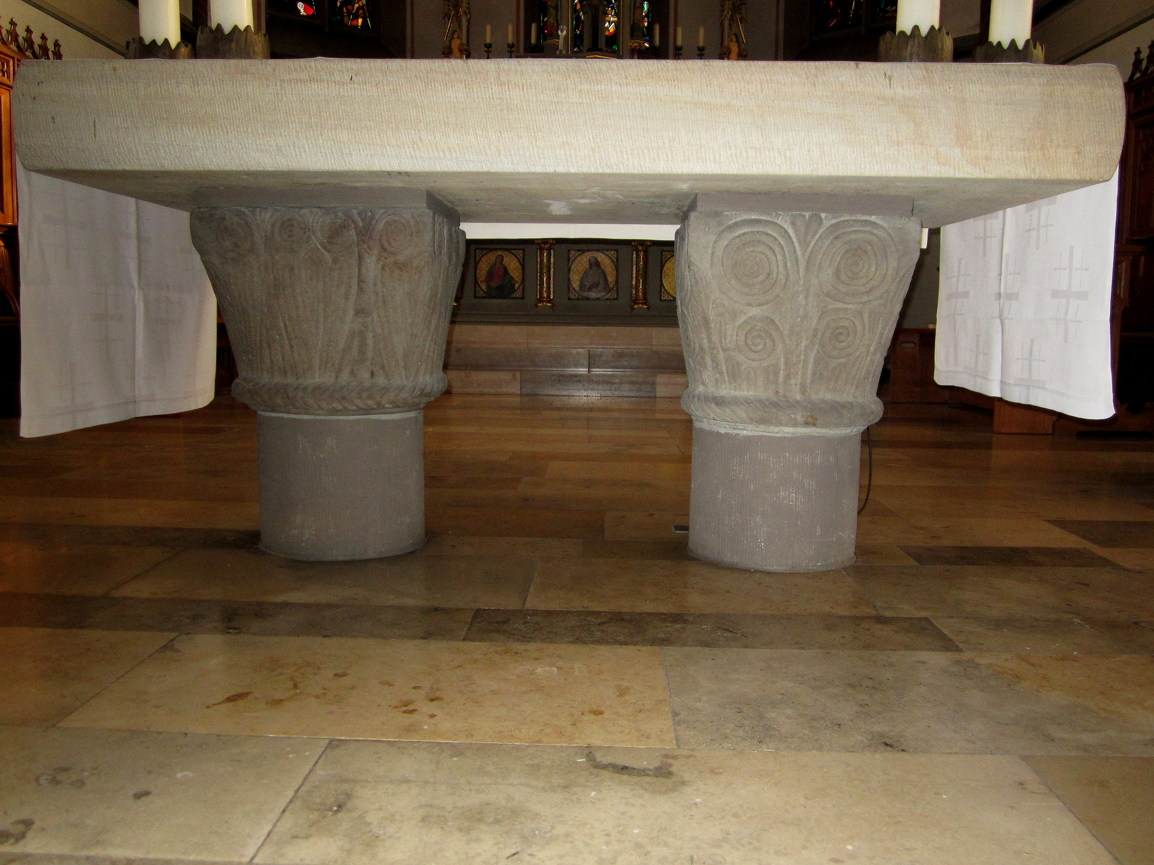 St. Mauritius (Hattingen), Altartisch entsprechend II. Vatikanischen Konzil mit zwei romanischen Kapitellen